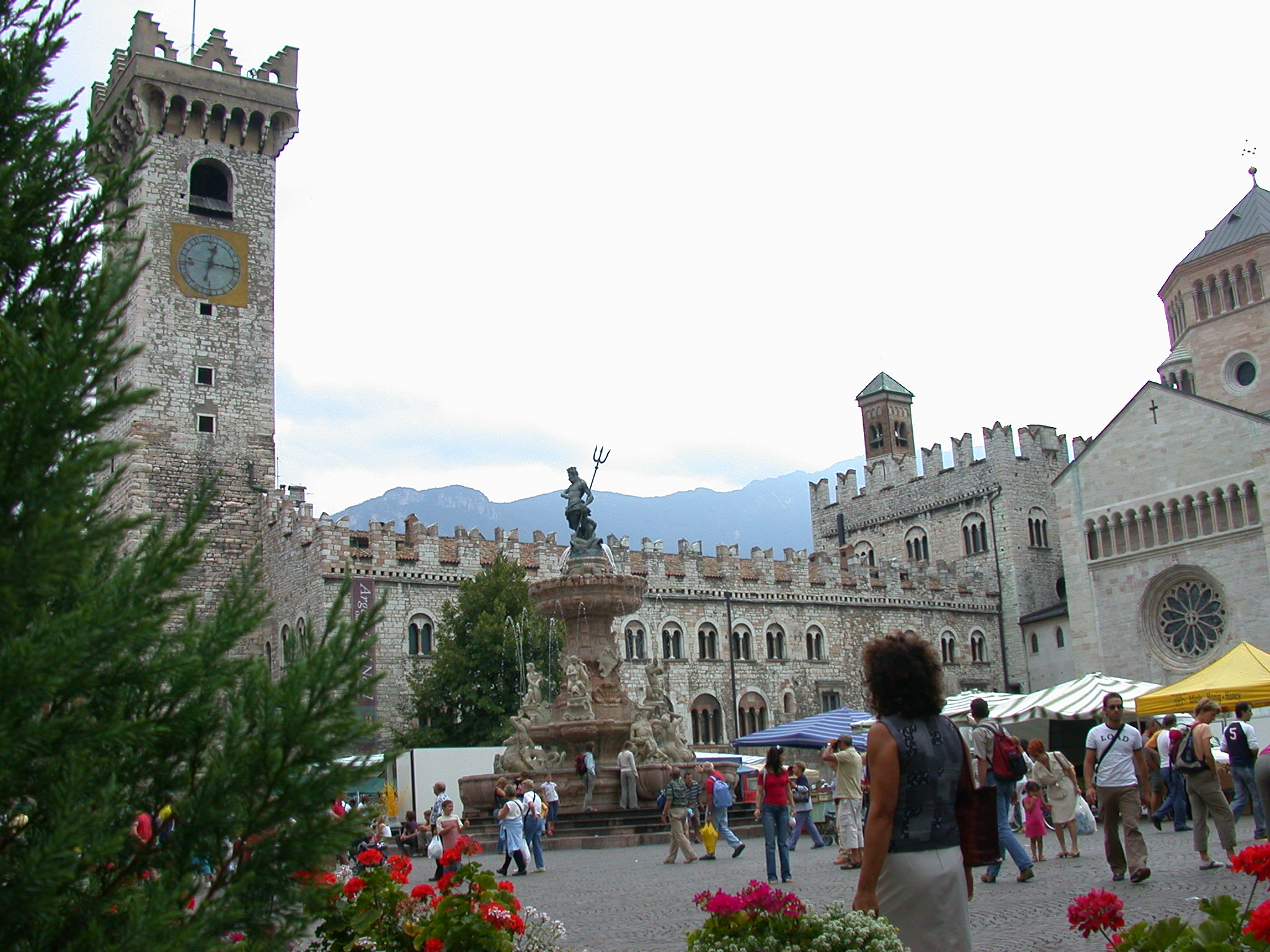 Piazza Duomo a Trento